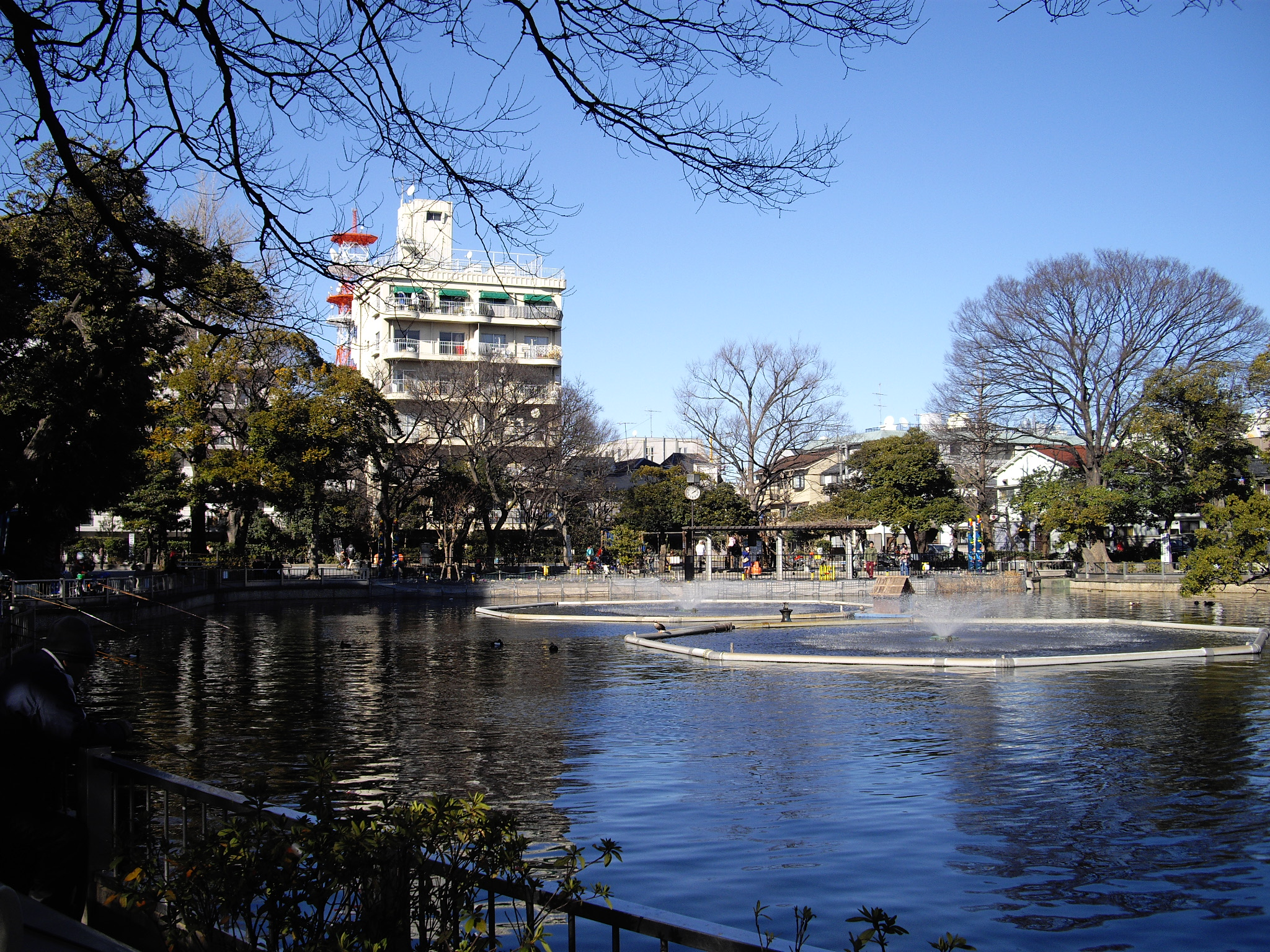 目黒区立清水池公園